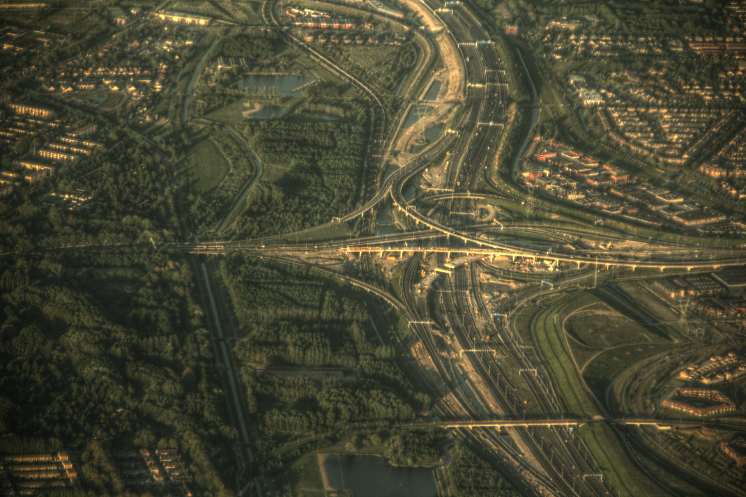 Knooppunt Vaanplein, gezien naar het oosten. Mei 2013